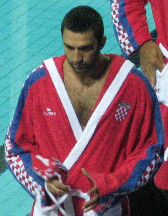 Josip Pavić